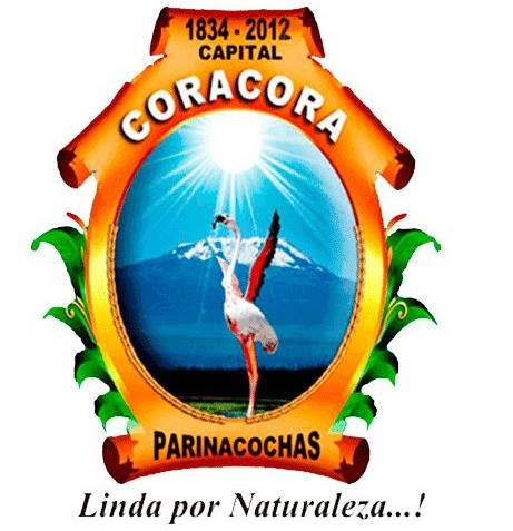 Escudo